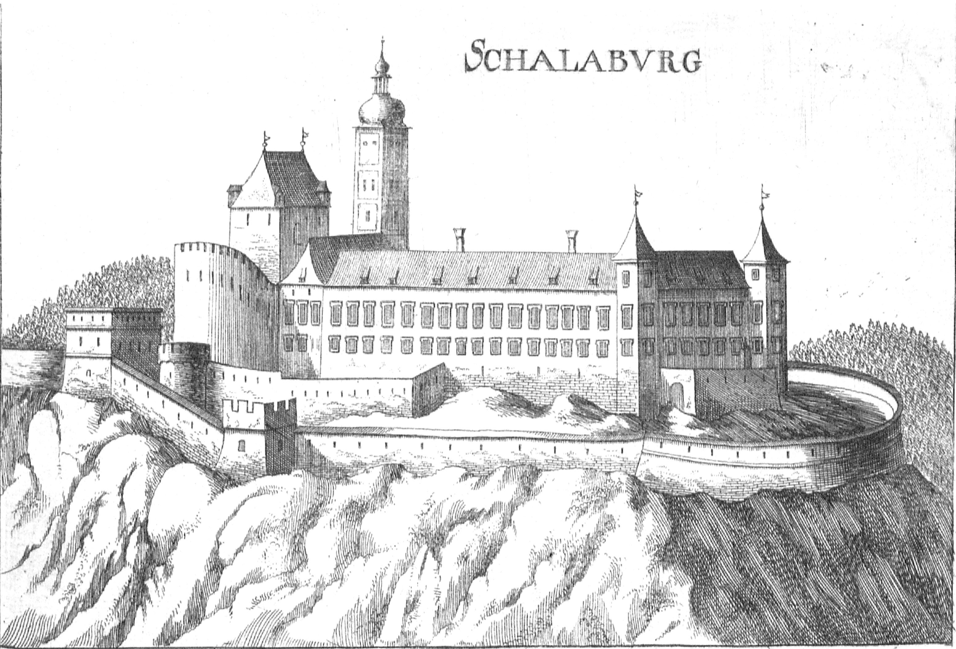 Kupferstich: Die Schallaburg in Niederösterreich um 1670